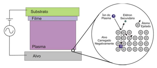 Representação esquemática do processo de sputtering. No detalhe: após a colisão do íon do plasma com o alvo pode ocorrer a implantação ou reflexão do íon, ou ainda a transferência de momento para os átomos do alvo, resultando na ejeção destes átomos, que é a definição de sputtering. Retirada de: LEITE, Douglas Marcel Gonçalves (2011). Propriedades Estruturais, Ópticas e Magnéticas de Filmes de GaMnN. Bauru: Universidade Estadual Paulista "Júlio de Mesquita Filho". 128 páginas.